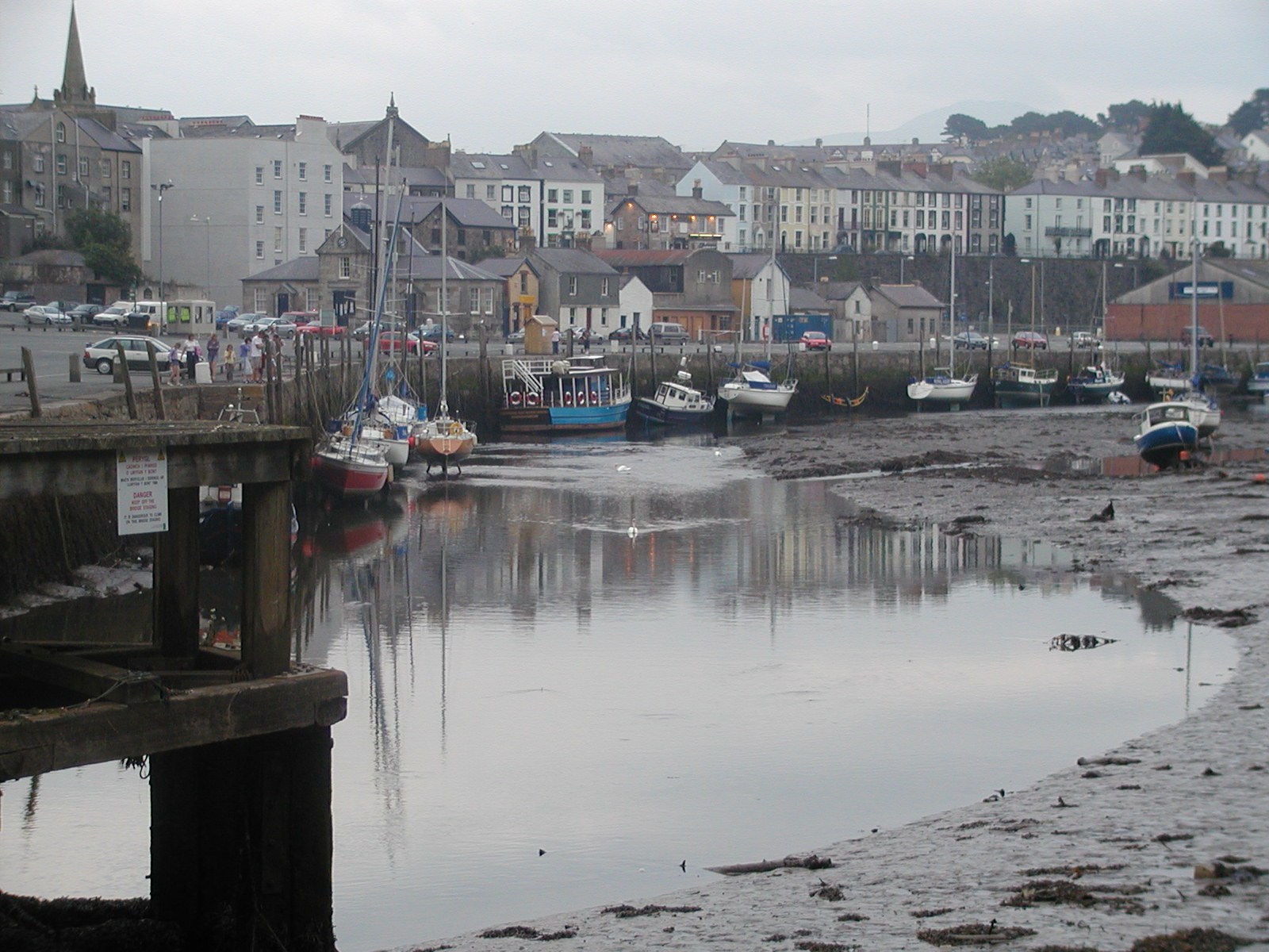 harbwrl Caernarfon